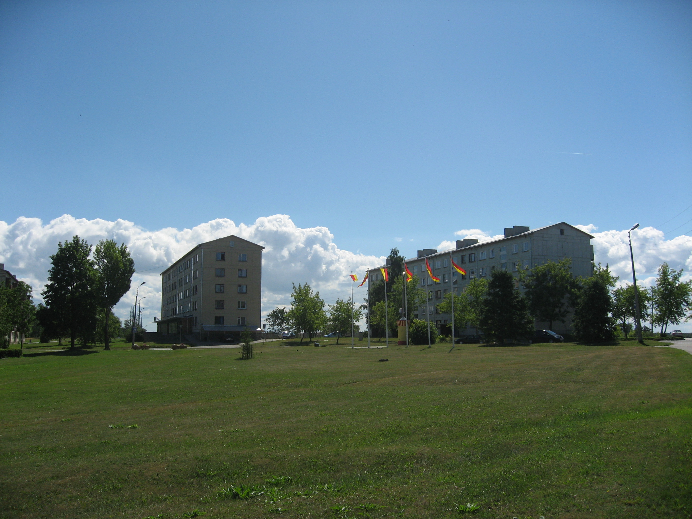 Kunda, domy v centru